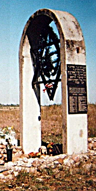 Памятник евреям - узникам гетто в Сиротино (Шумилинский район).